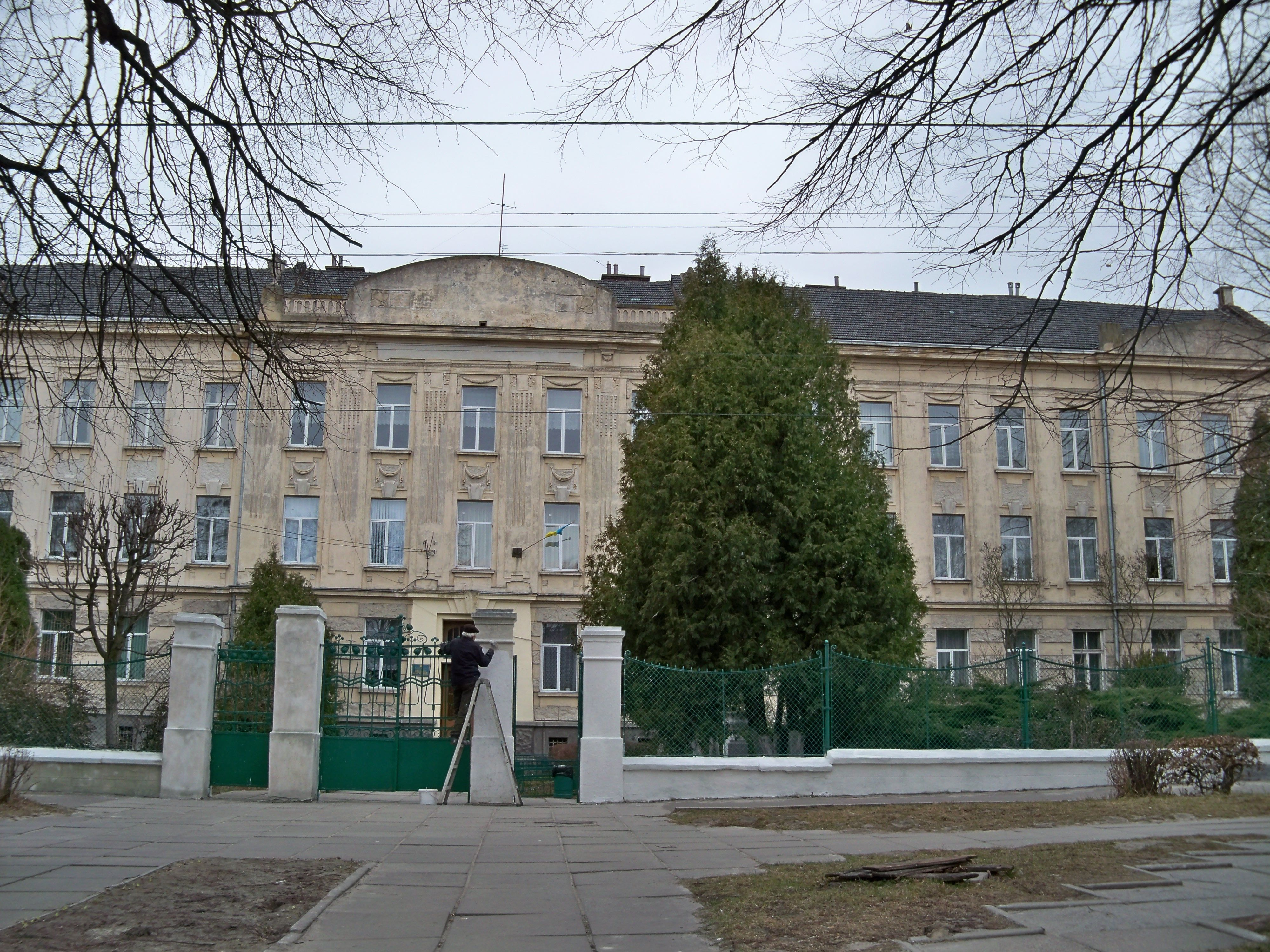 Жіноча гімназія /мур./, Сокаль, вул.Шептицького,88